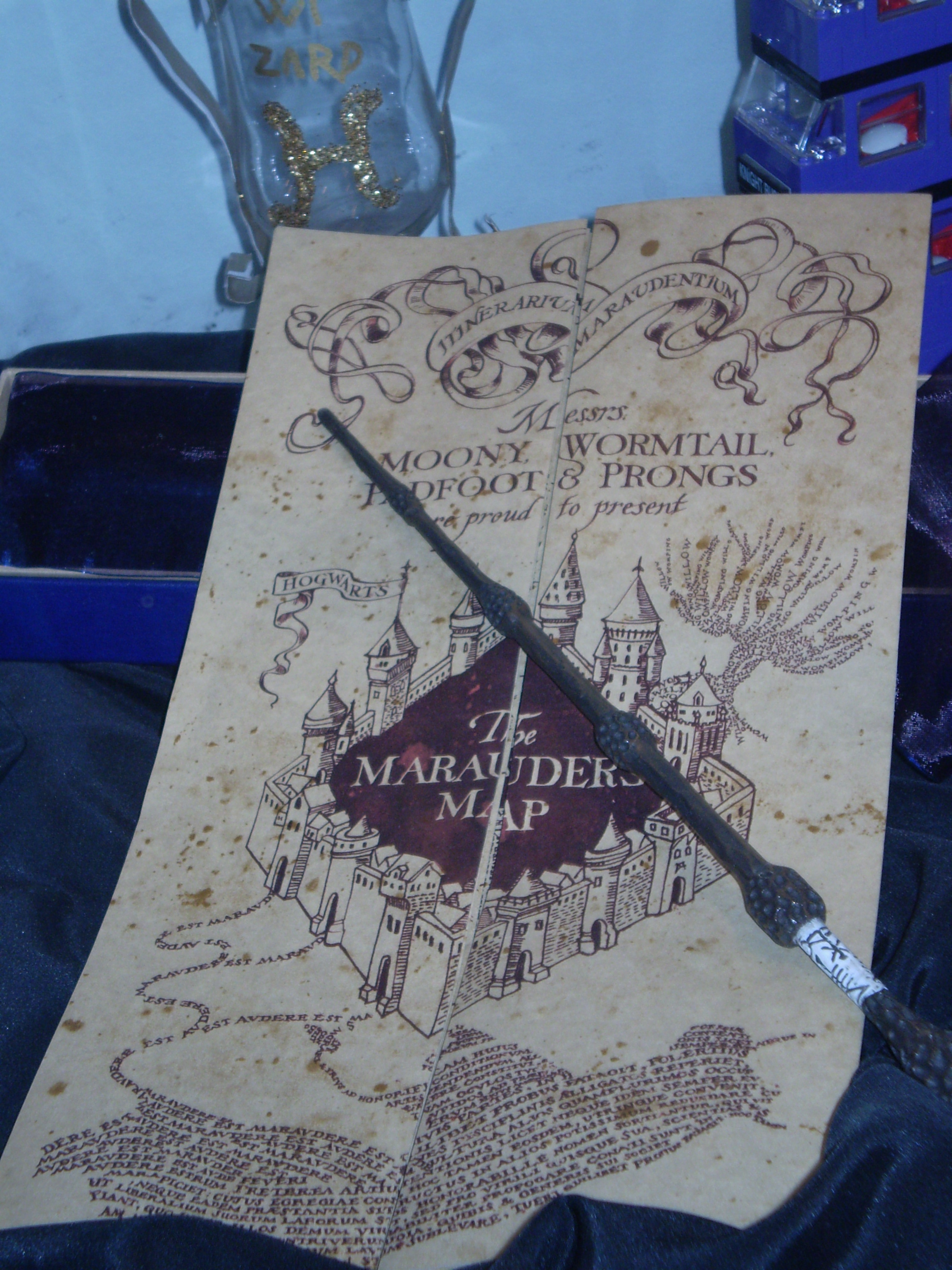 Mapa d'amagatotis del món de Harry Potter.